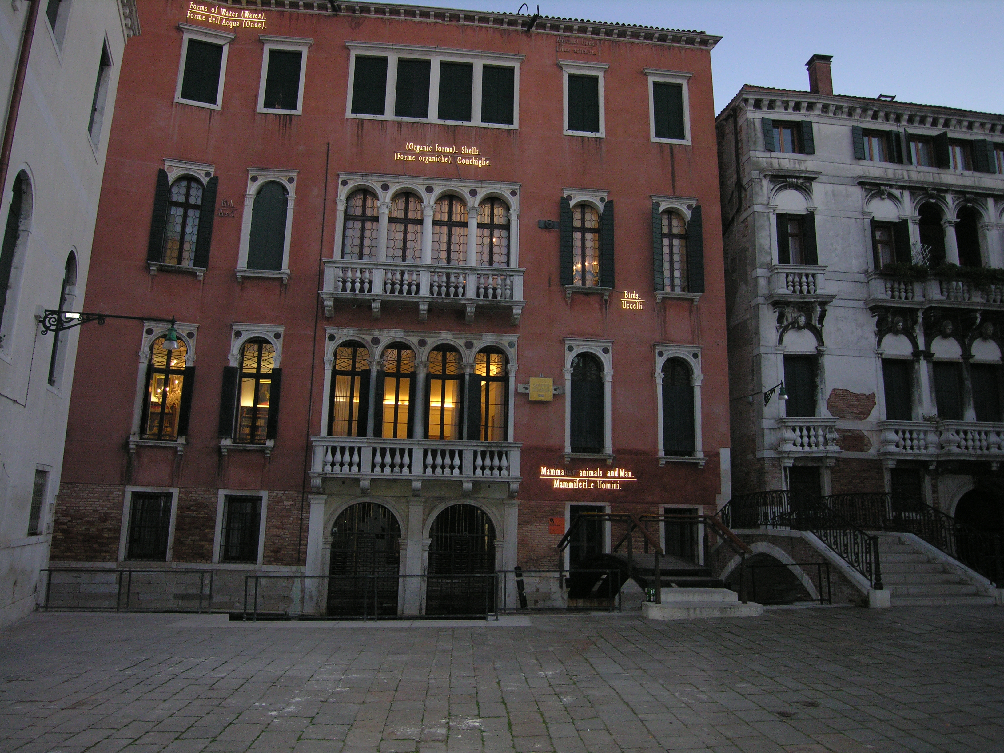 Castello, 30100 Venezia, Italy